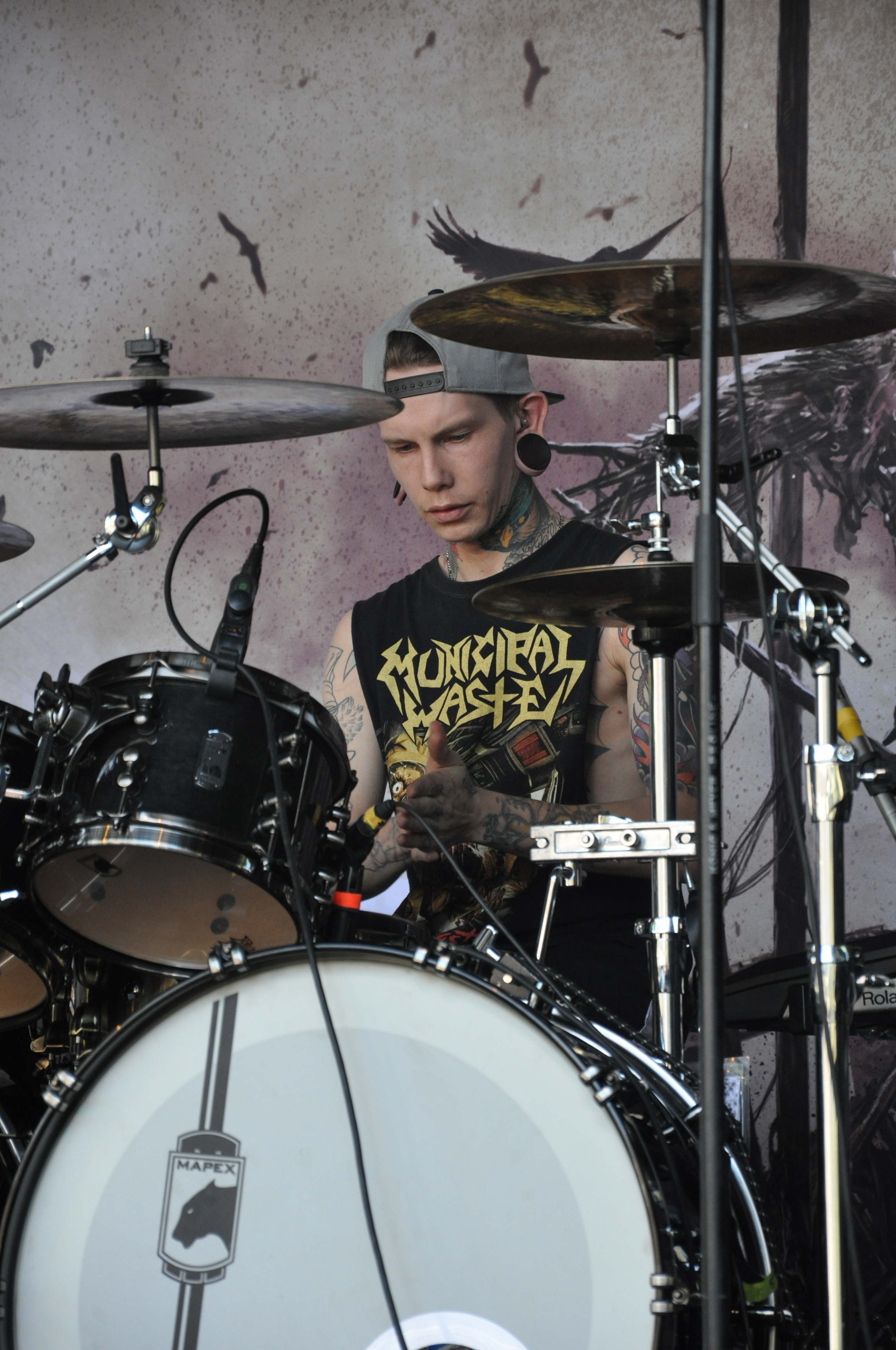 Thy Art Is Murder auf dem Summerblast Festival 2014